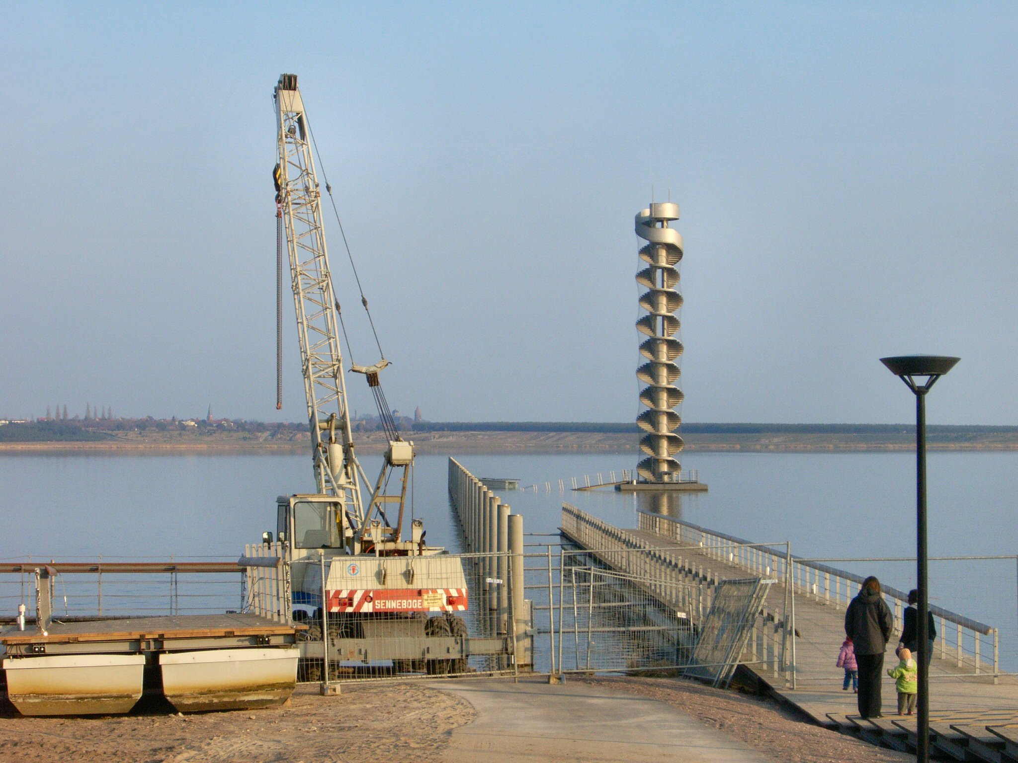 Bitterfeld,zerstörte Seebrücke zum Pegelturm nach dem Orkan Kyrill 2007